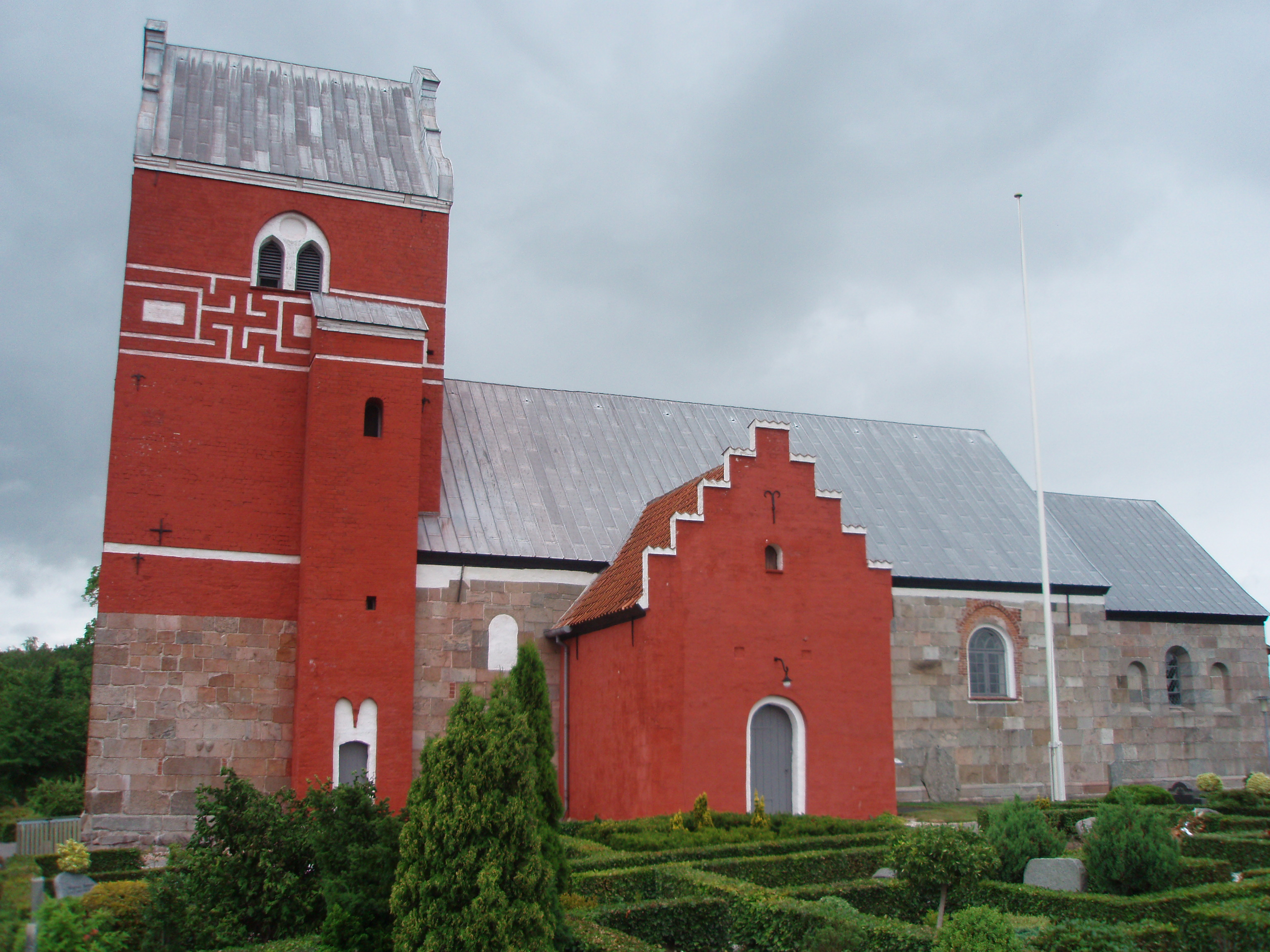 Ålum Kirke